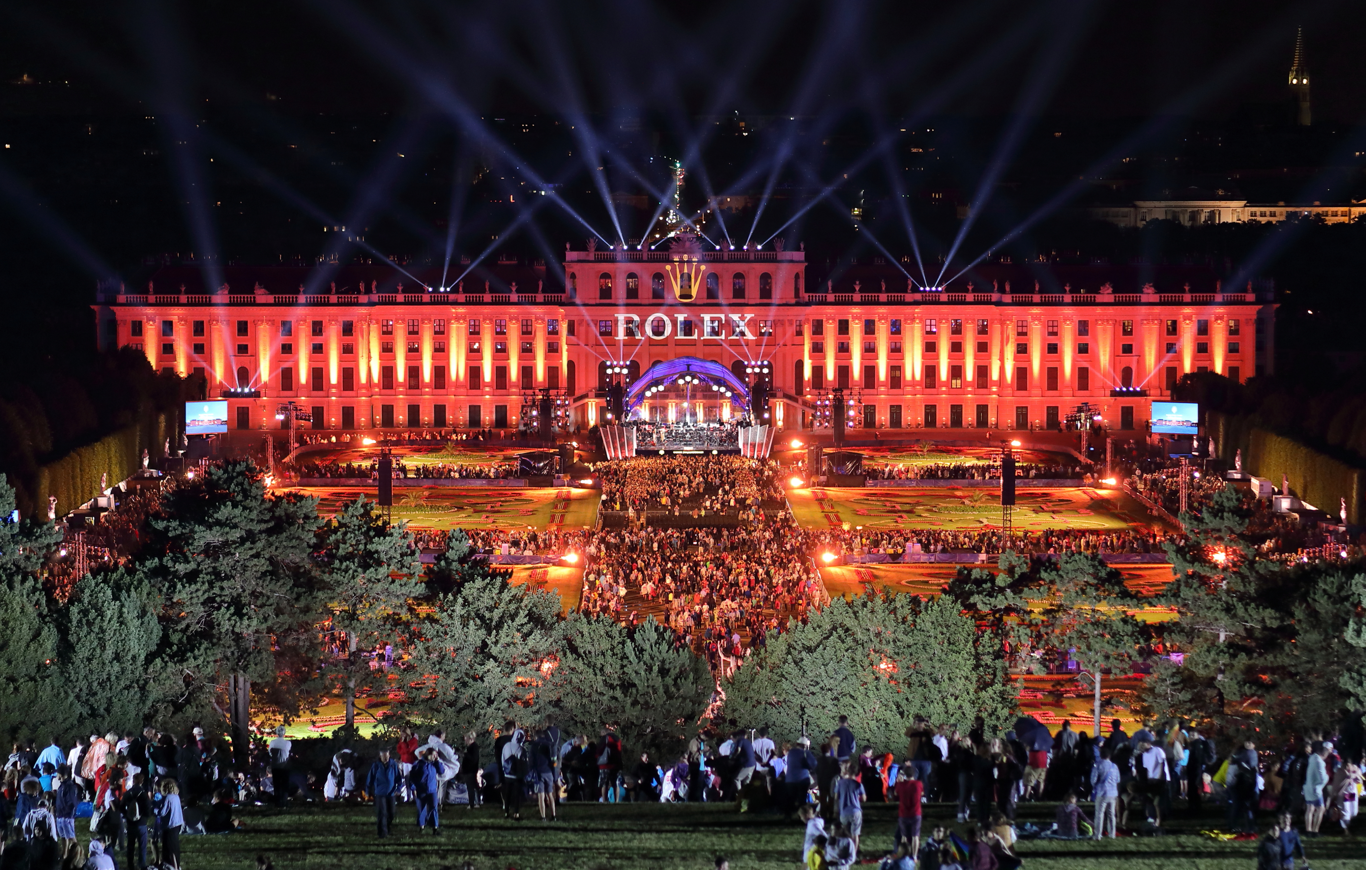 Sommernachtskonzert 2019 der Wiener Philharmoniker am 20. Juni 2019 im Schönbrunner Schloßpark mit offener Bühne Richtung Gloriette in Wien.Dirigent war Gustavo Dudamel und als Solistin wirkte Yuja Wang. Das Konzert unter dem Motto „Rhapsody in Blue“ wurde von rd. 85.000 Menschen besucht und in rund 80 Ländern übertragen.